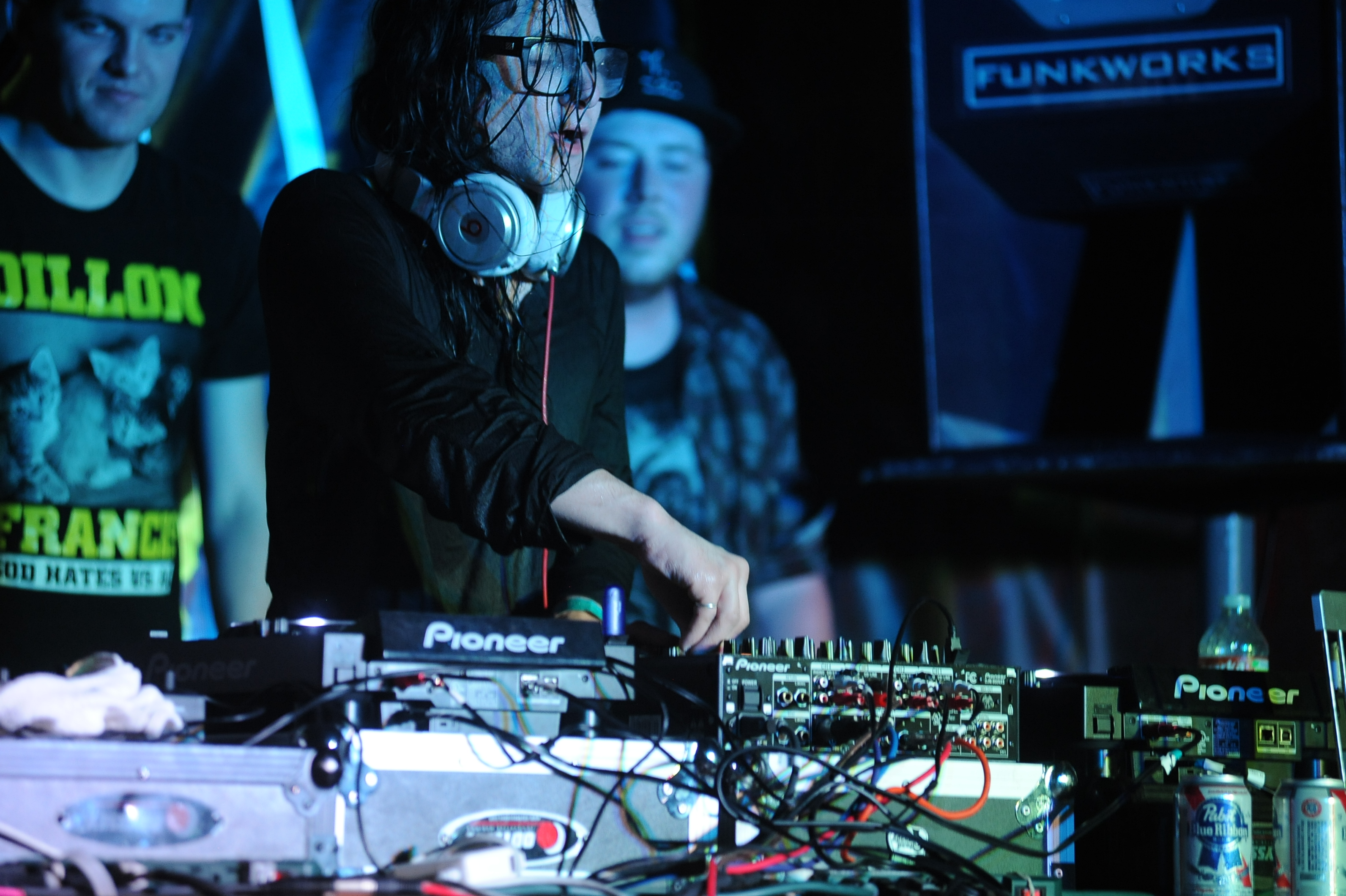 Skrillex